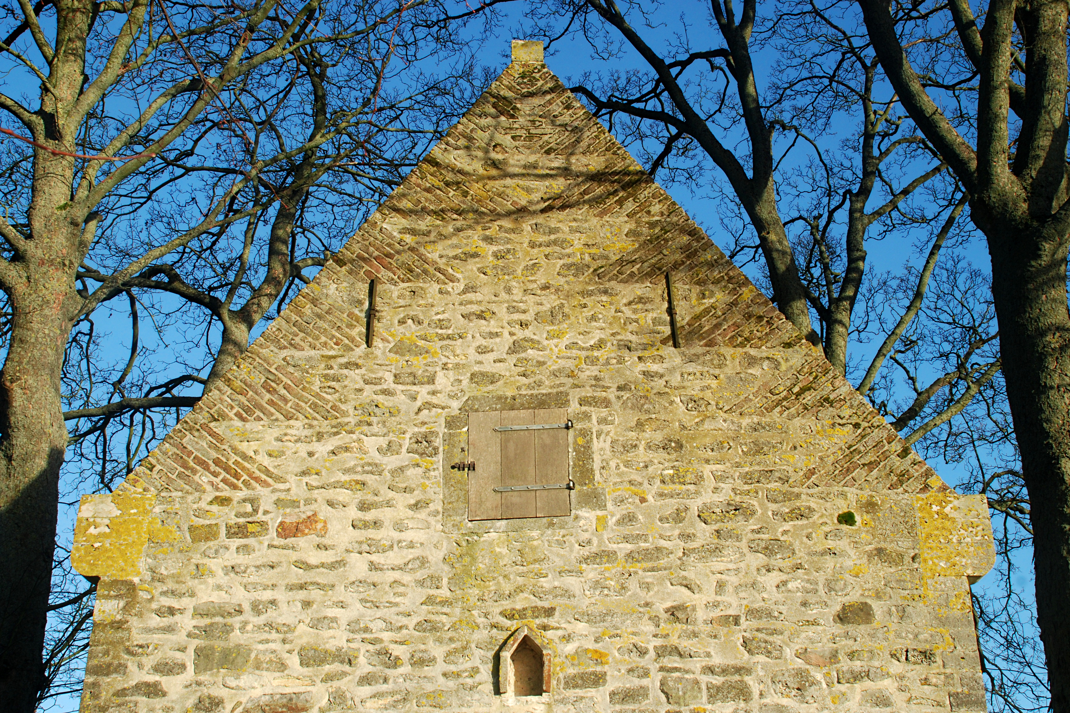 Belgique - Brabant wallon - Chaumont-Gistoux - Longueville - Chapelle du Chêneau